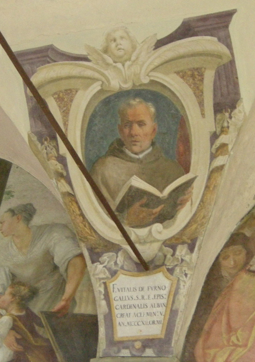 Chiostro di ognissanti, personalità francescane 16 Vital du Four